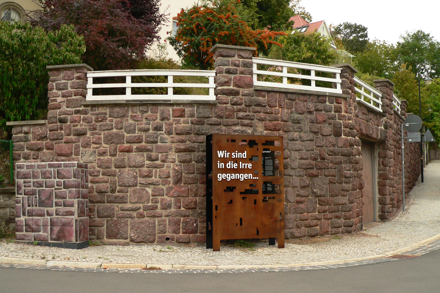 Mahnmal zum „Entjudungsinstitut“ in Eisenach